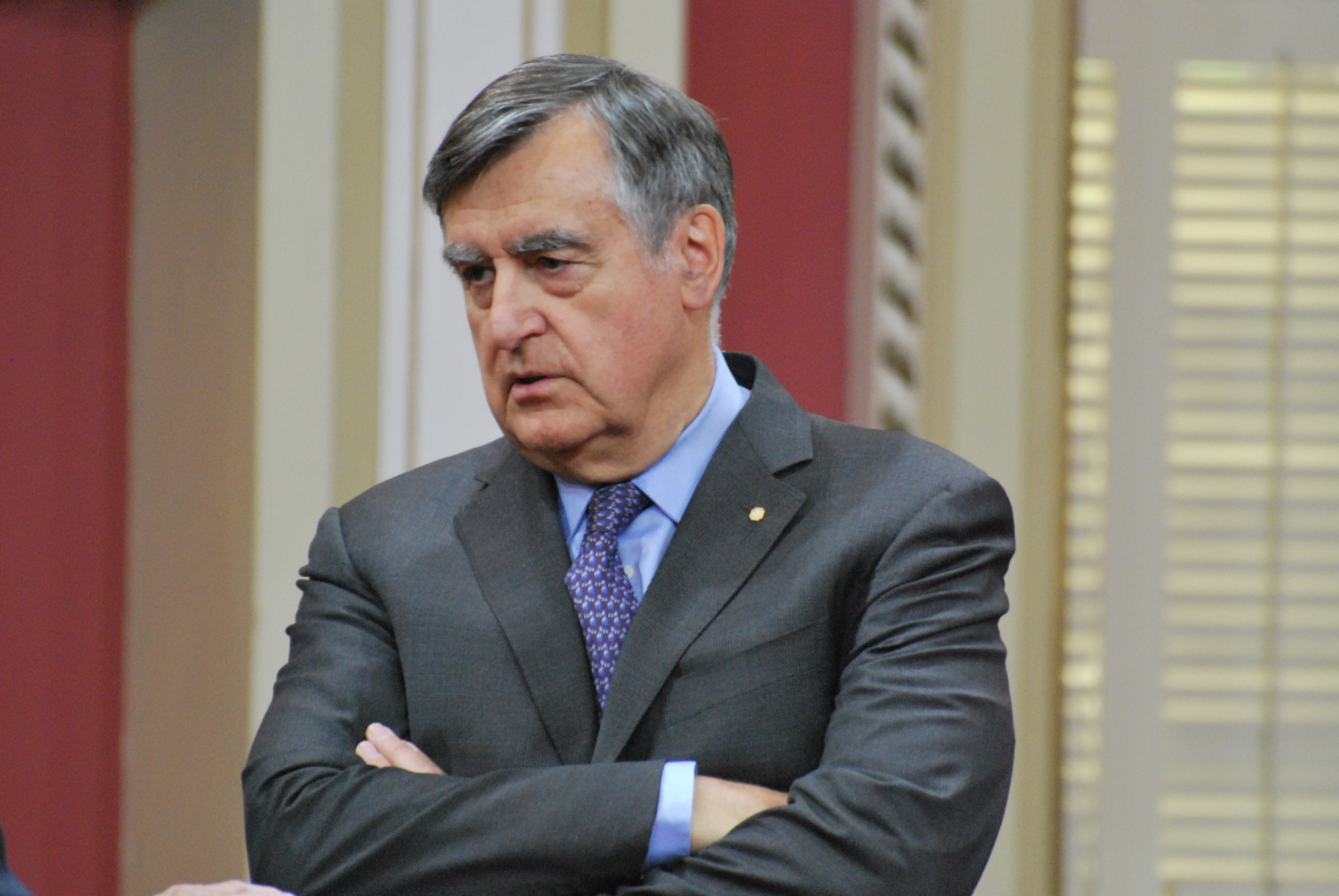 Cérémonie de remise de l'ordre national du Québec 2013. Lucien Bouchard